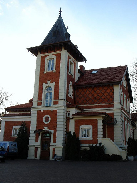 Hotel Aleksander we Włocławku (dawny Pałacyk Bojańczyka)